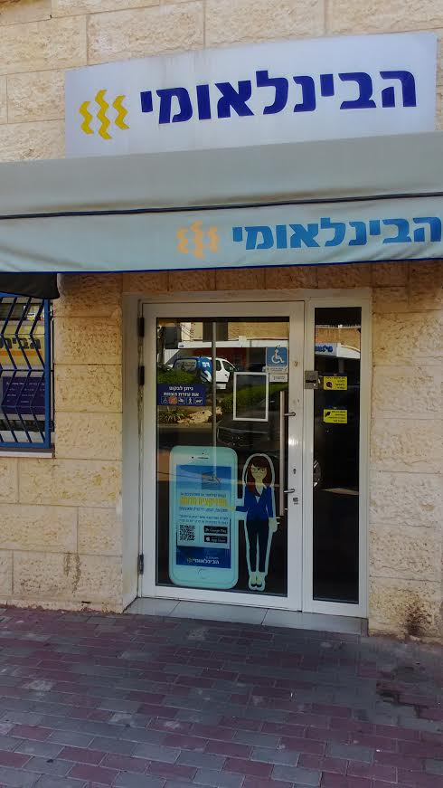 הבנק הבינלאומי, סניף קרית מוצקין